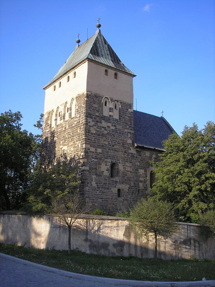 Kyje - kostel